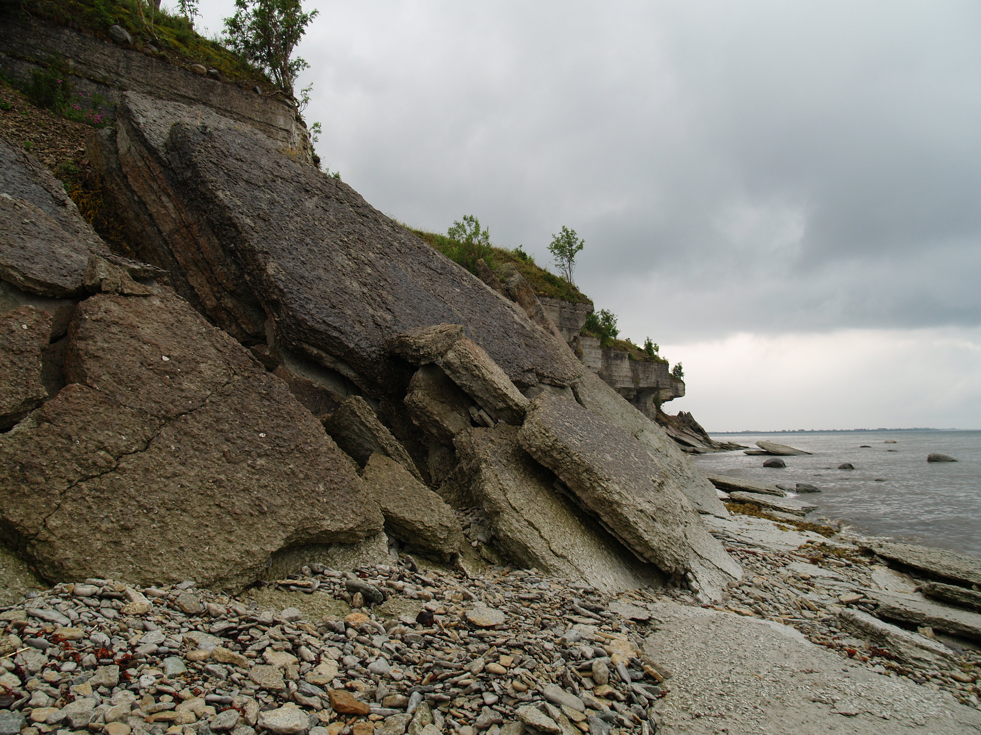 Väike-Pakri saare pankrannik